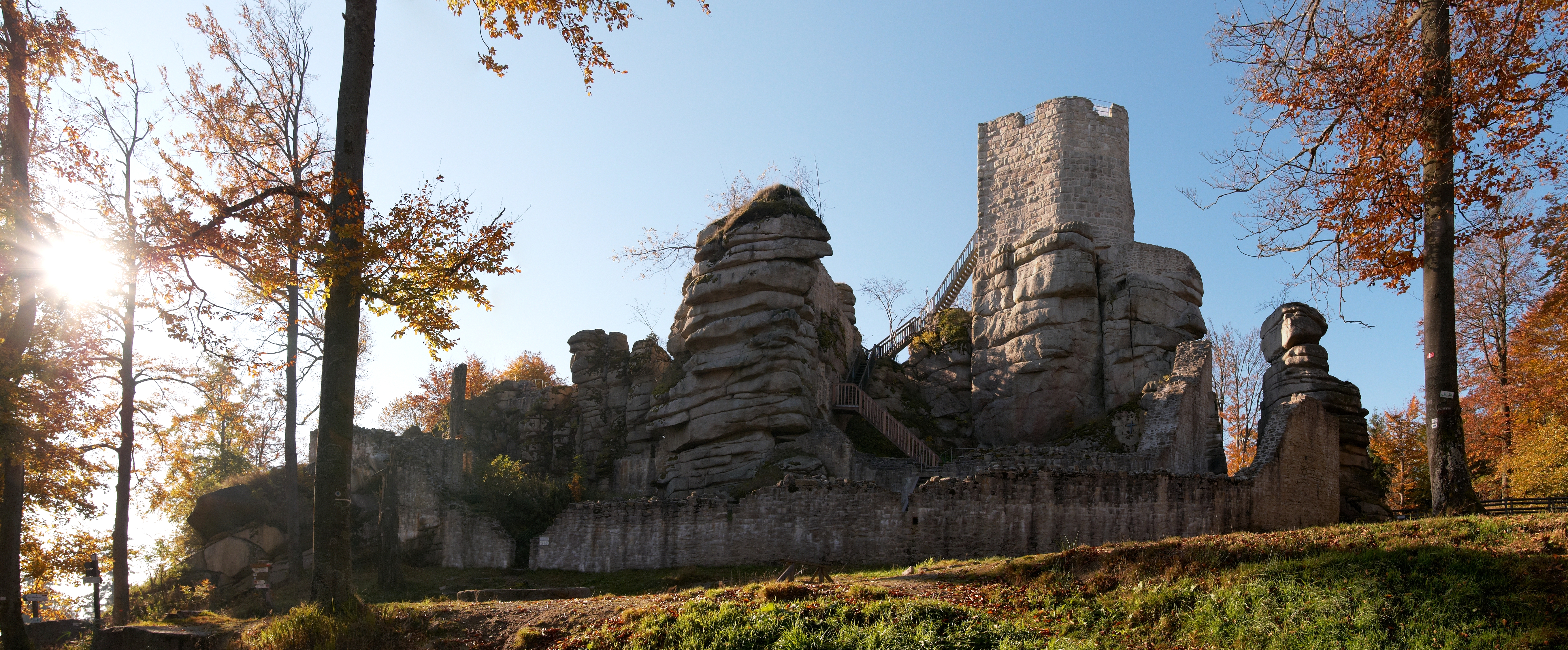 Die Burgruine Weißenstein im Steinwald nahe Friedenfels. Panorama aus drei Einzelaufnahmen.